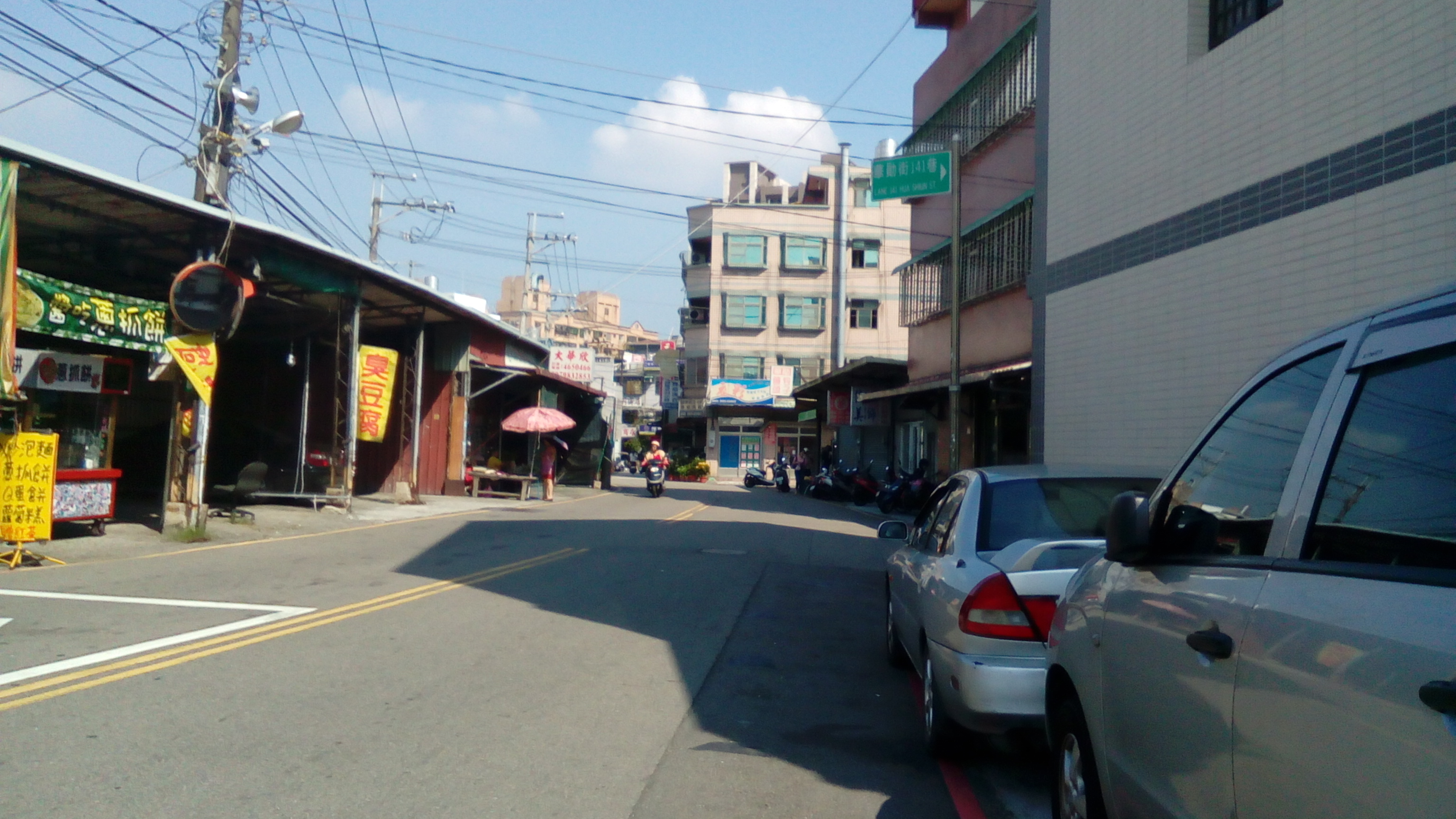 中壢市華勛街